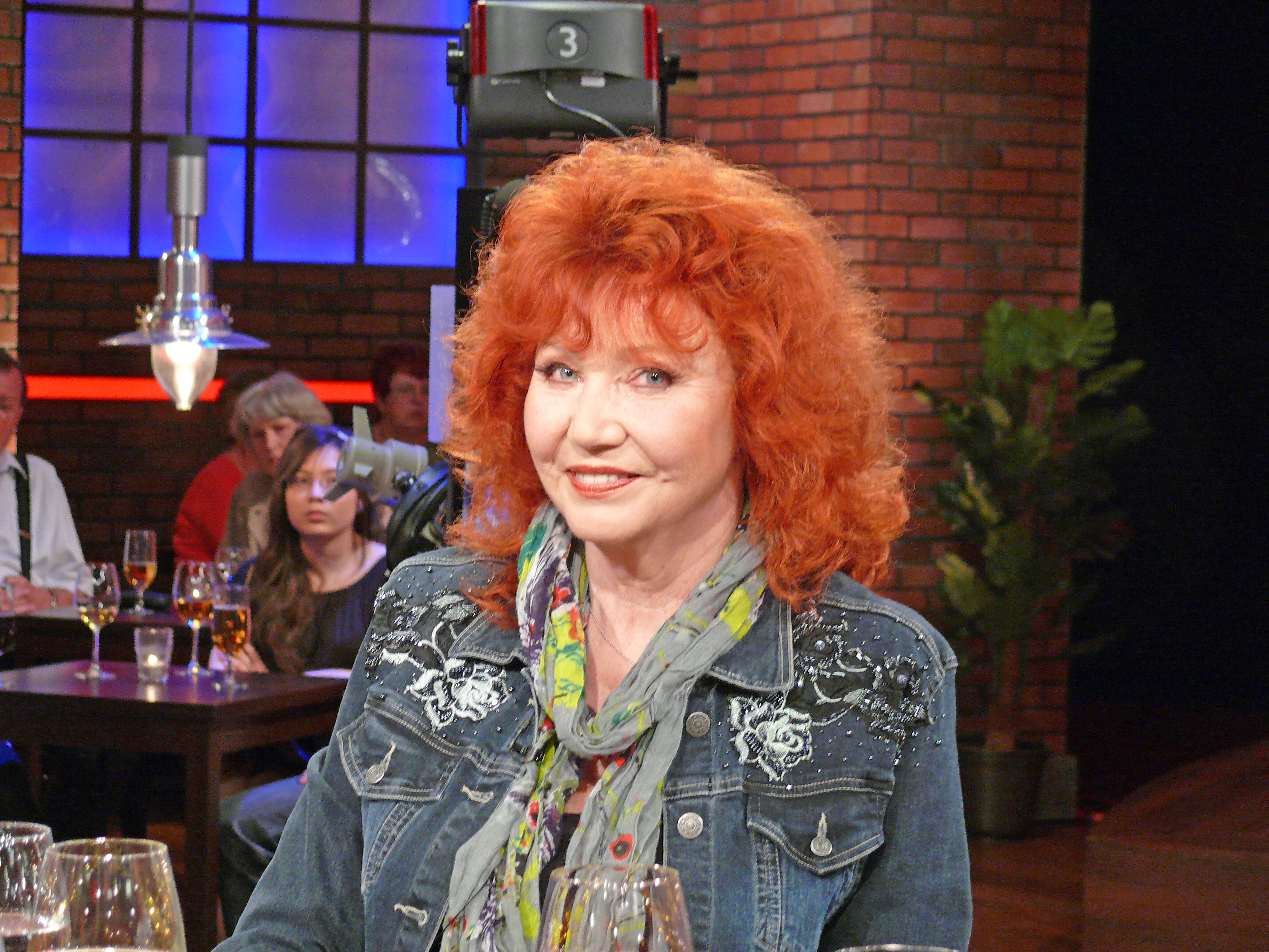 Regina Thoss zu Gast im MDR Talk "Unter uns" am 27.04.2013